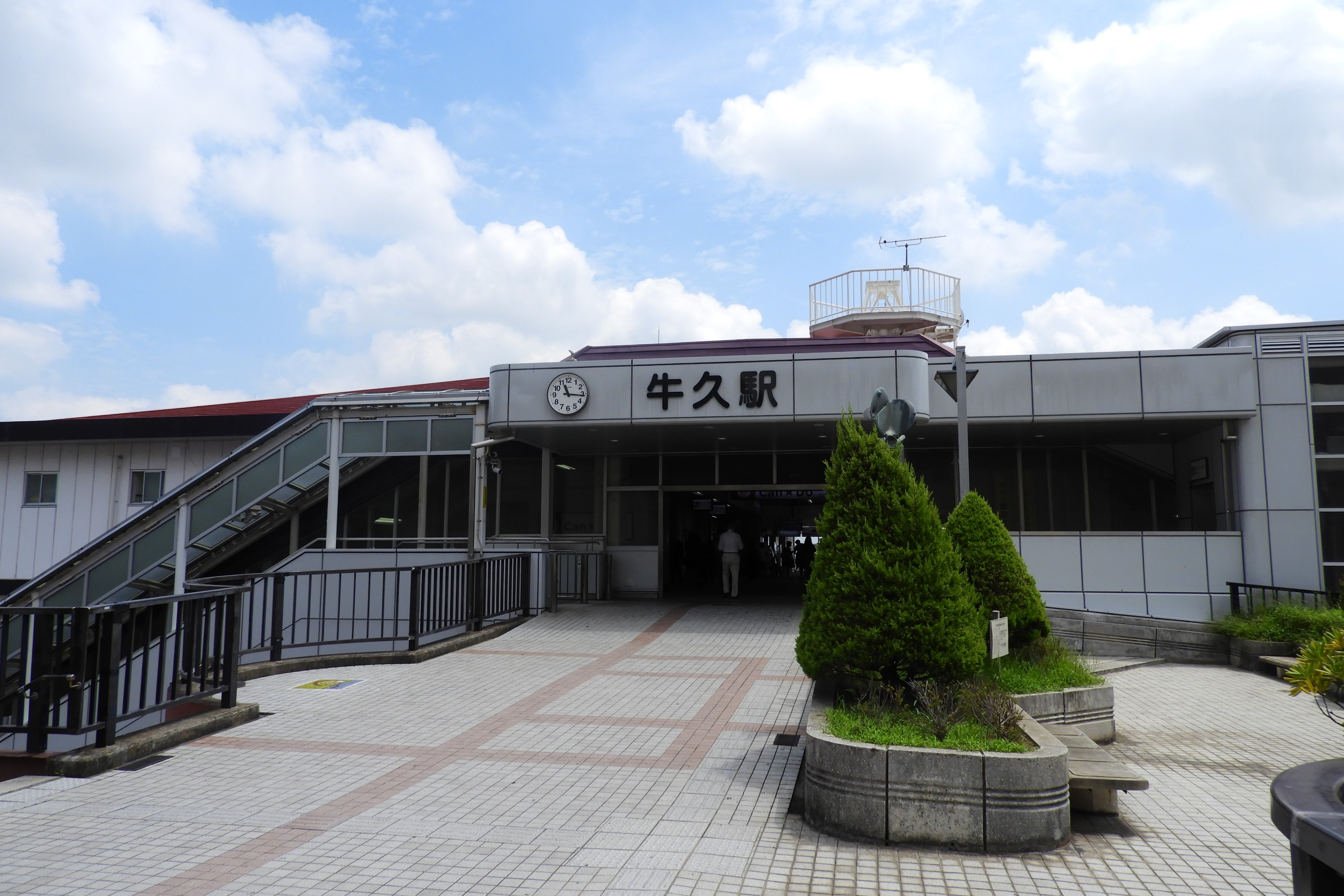 牛久駅西口駅舎 Nikon Coolpix B700